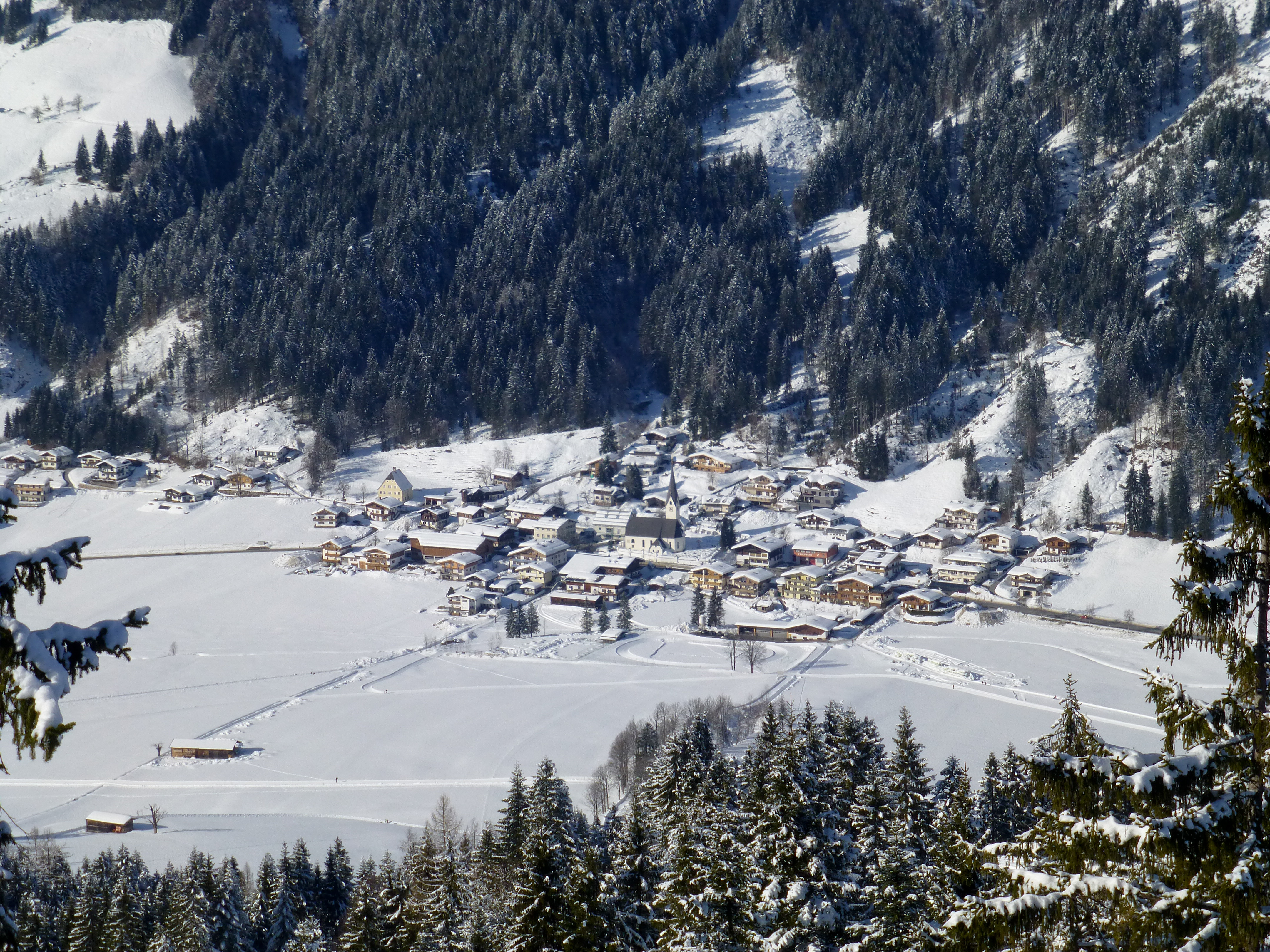 St. Jakob in Haus; Winteransicht aus dem Sessellift an der Buchensteinwand